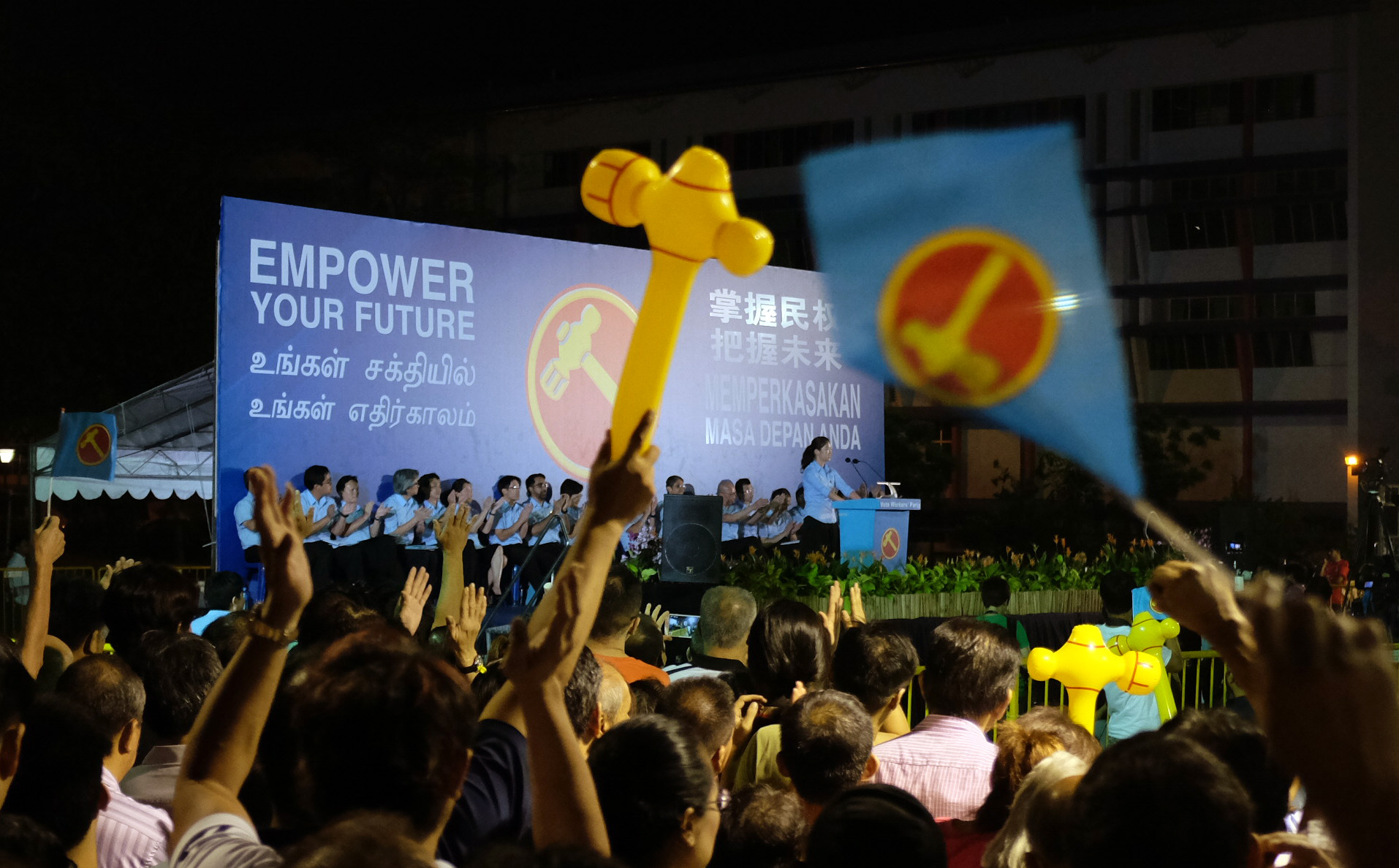 Ubi Ave 3 7 Sep 2015